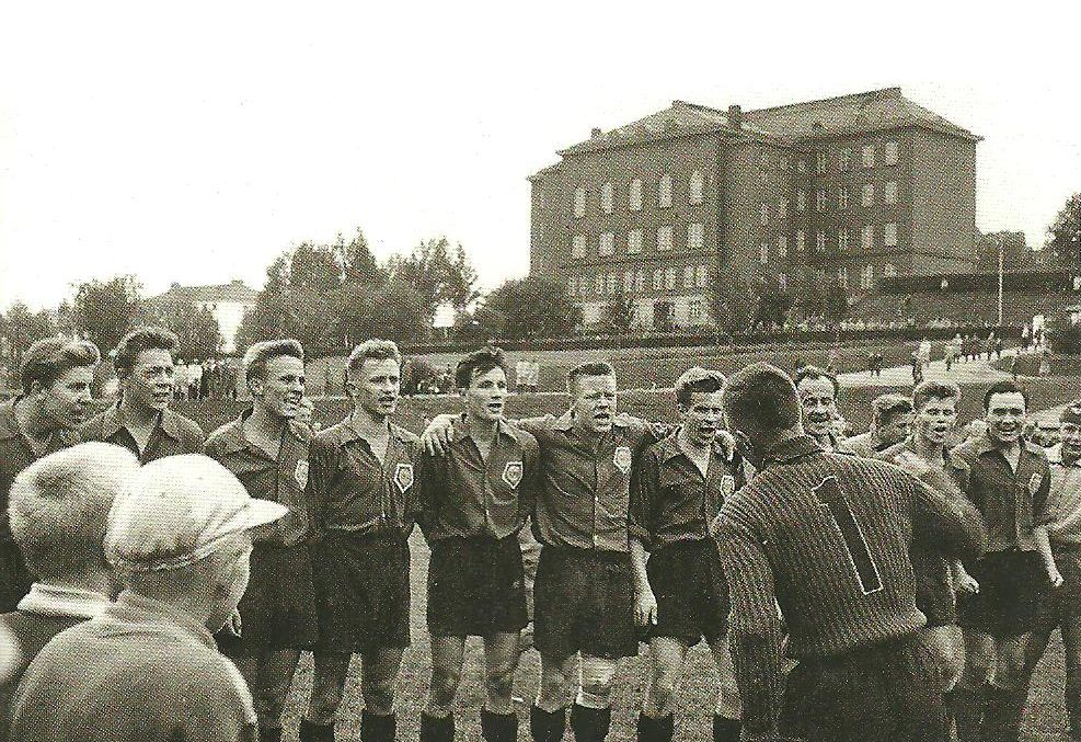 LPM juhlimassa Suomi-sarja nousuaan vuonna 1957